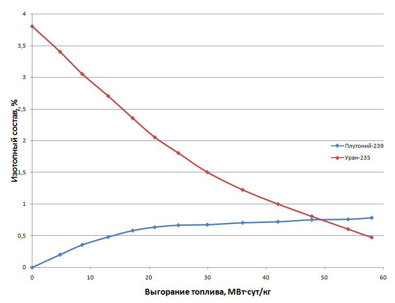 Примерная зависимость уменьшения ядер урана-235 и накопления плутония-239 от глубины выгорания в реакторе ВВЭР с топливом обогащением около 4 %